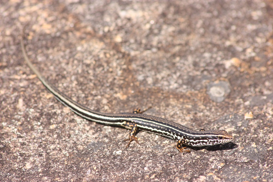 Ctenotus labillardieri, Cape Legrand National Park, Australie Occidentale